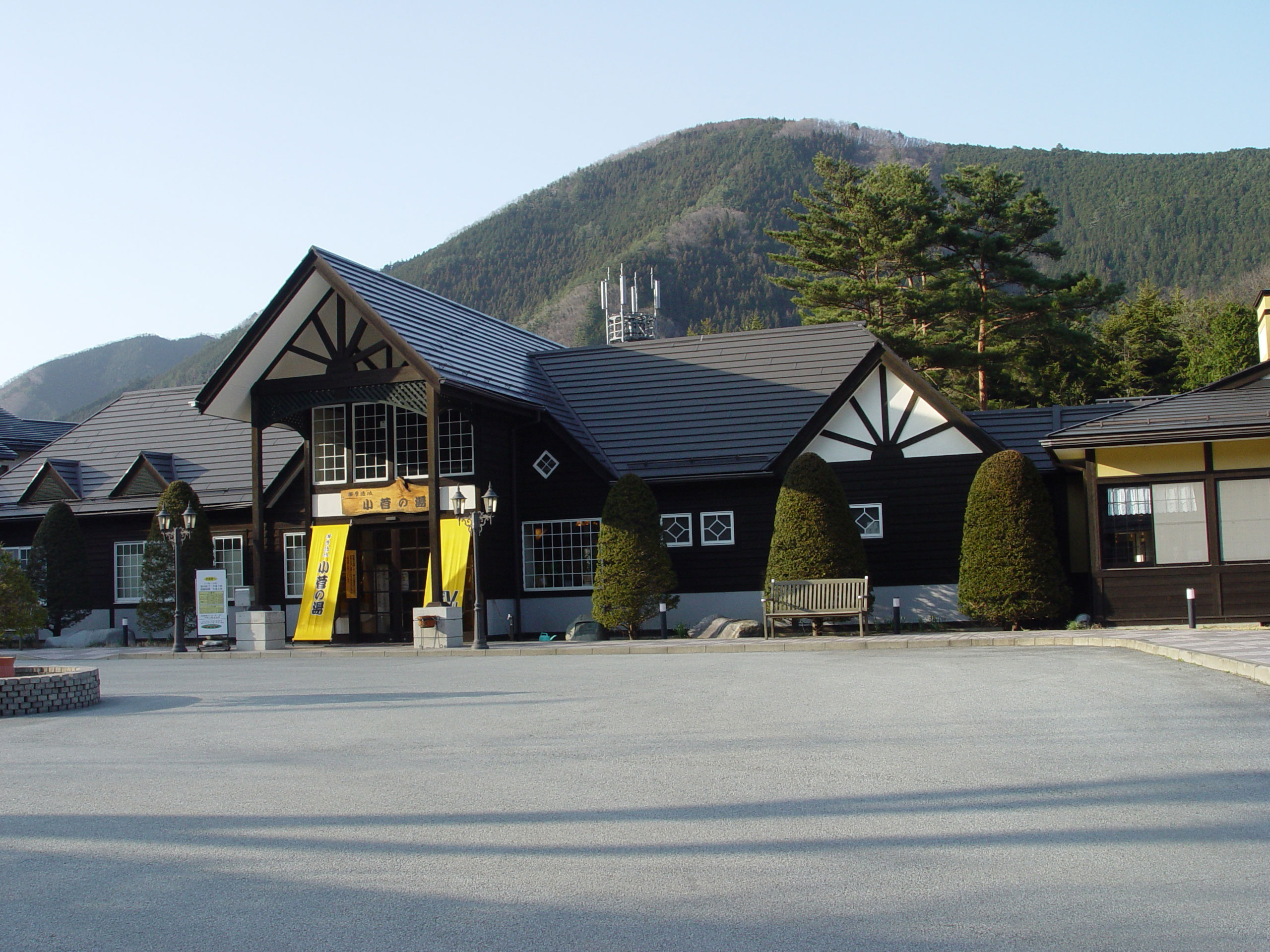 Kosuge no Yu Spa, Kosuge Village ja: 小菅村、小菅の湯